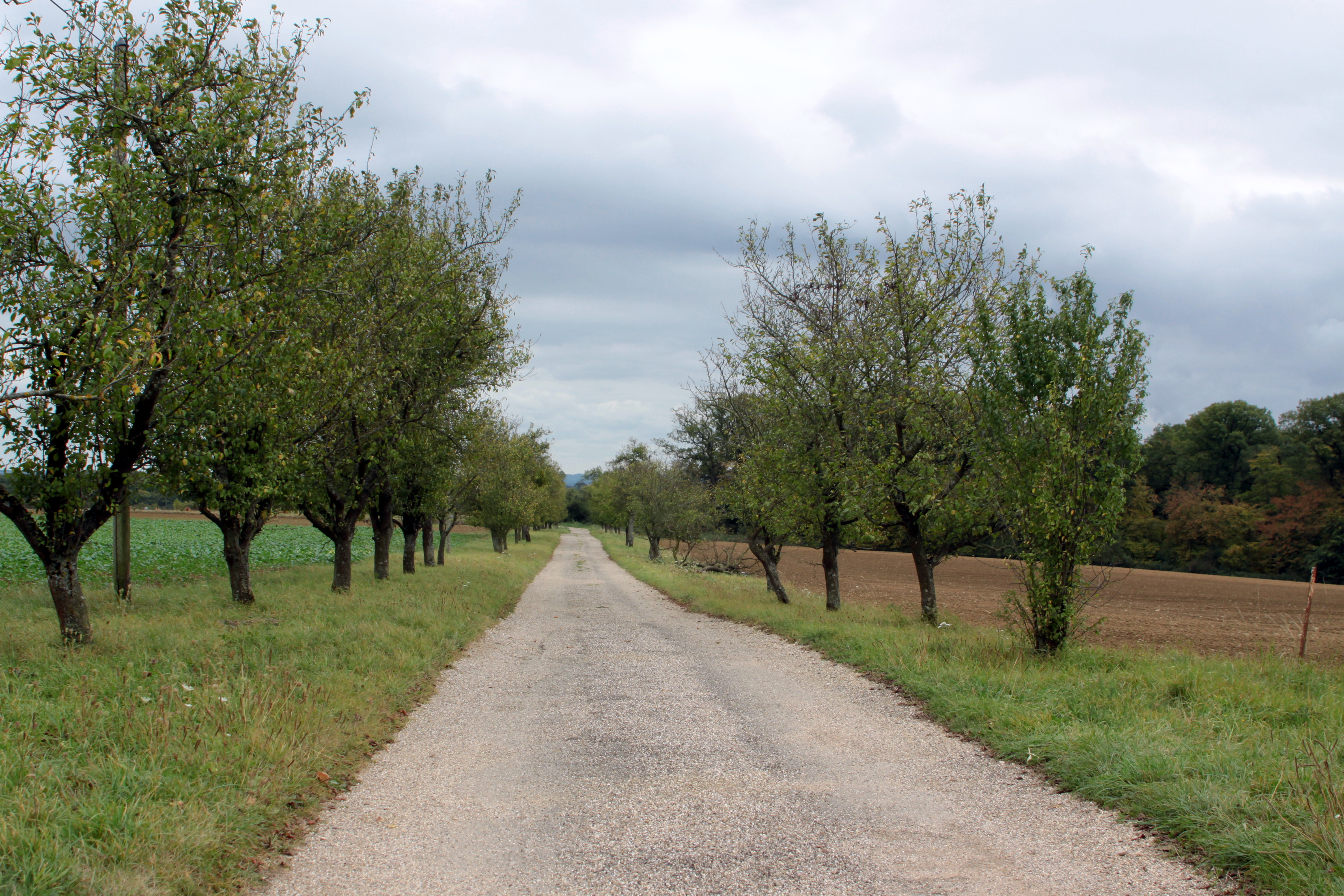 Feldwee mat Tarmac iwwerzunn